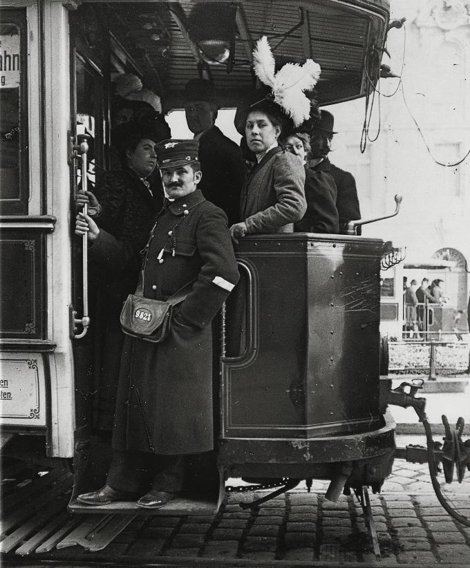 Rückwärtige Plattform einer Wiener Straßenbahn